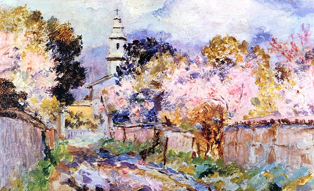 obra que se sitúa dentro de una representación naturalista del paisaje llegando al bucolismo. Esto, porque González, aún en camino hacia su propia pintura, se mantiene en la composición clásica del paisajismo aunque presentando la maestría que lo caracterizó dentro de toda su obra.